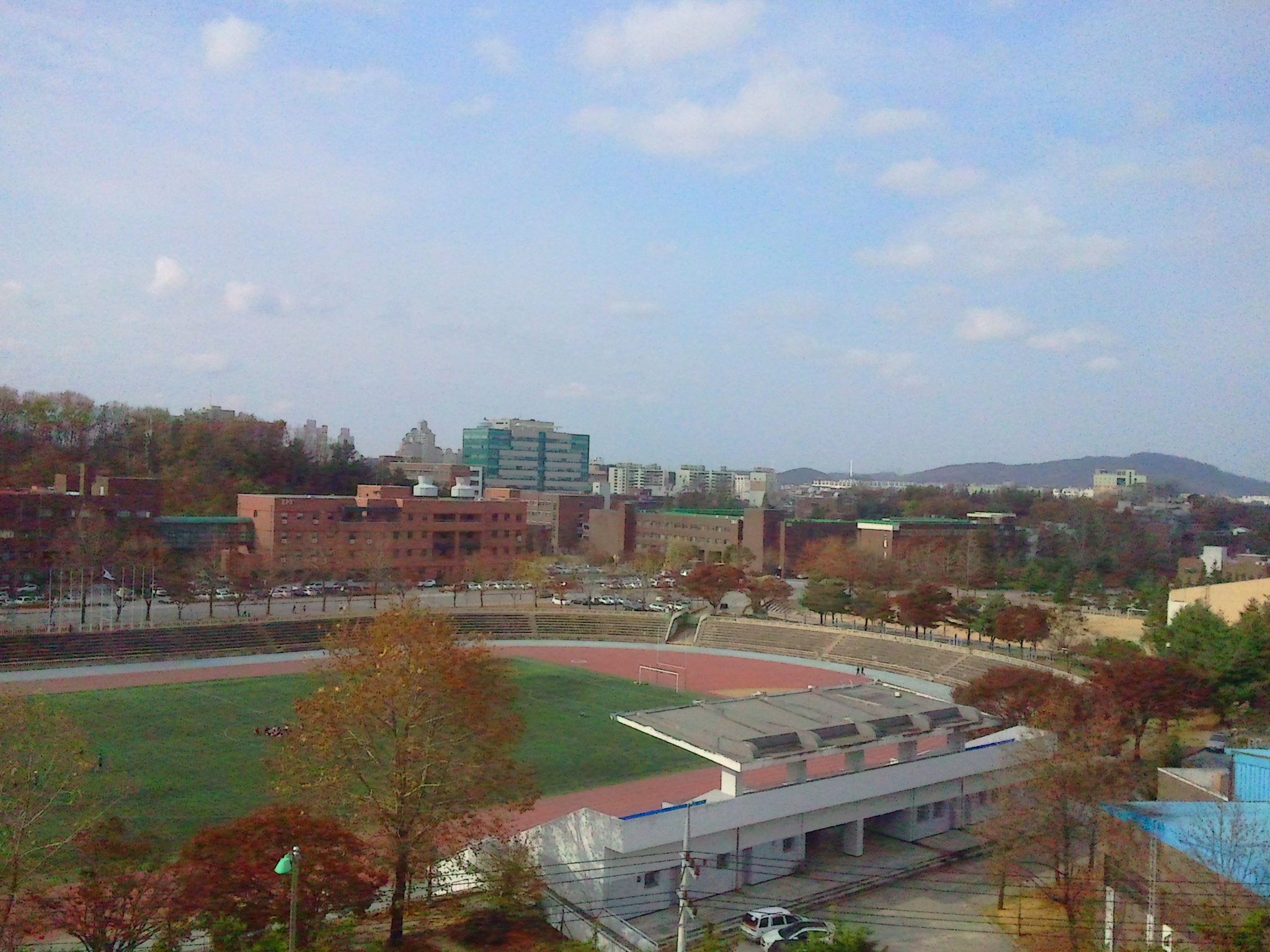 Gaesin-dong, Heungdeok-gu, Cheongju